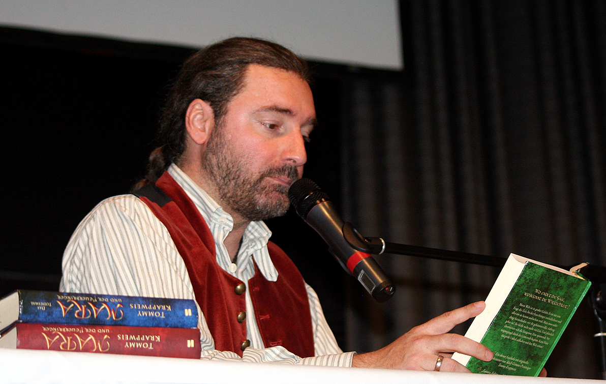 Tommy Krappweis liest aus Mara und der Feuerbringer auf der RingCon 11, Bonn 2012.